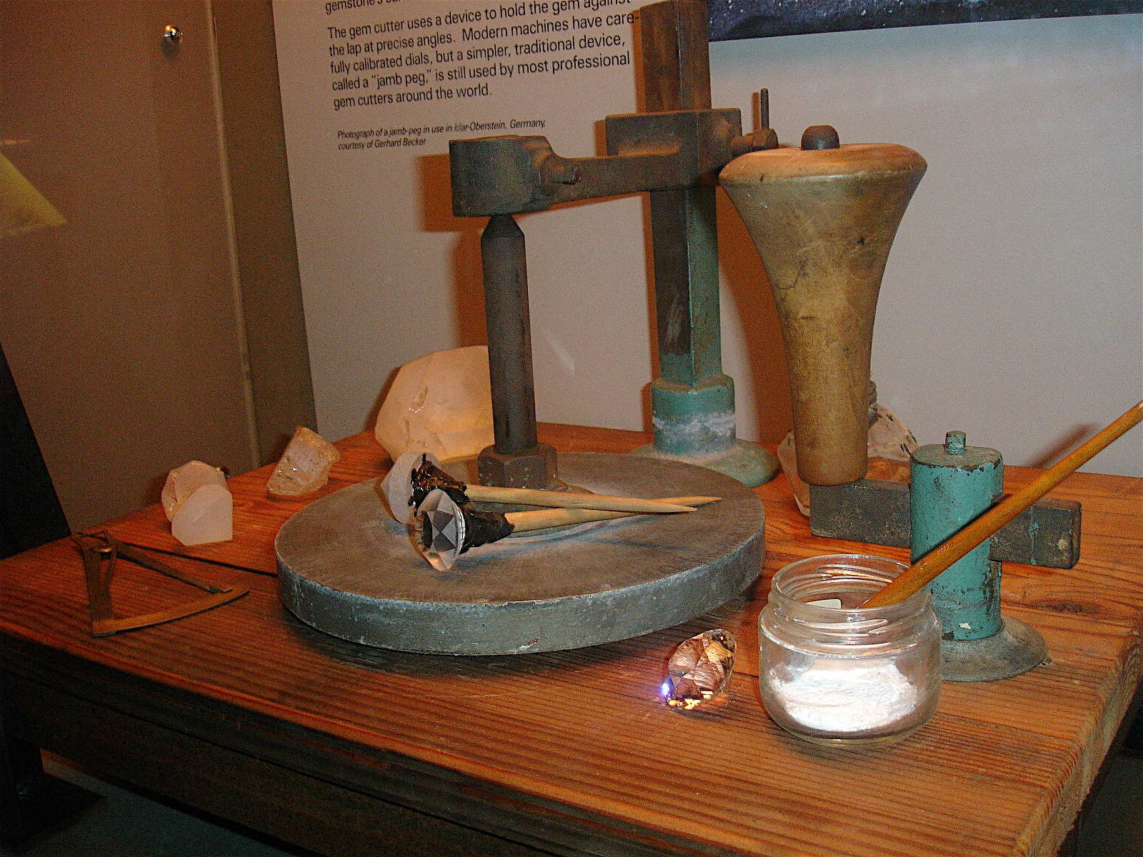 Gem Cutter Accessories